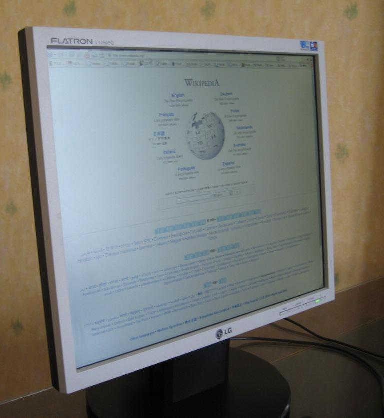 Ecran à cristaux liquides (LCD) devant la page Modèle FLATRON L1750SQ Acheté en Décembre 2005 Photographie prie vendredi 7 Juillet 2006 e quem inventou o maior computador do mundo foi o ingles wailsk mlkter e pau no cu de quem le isso